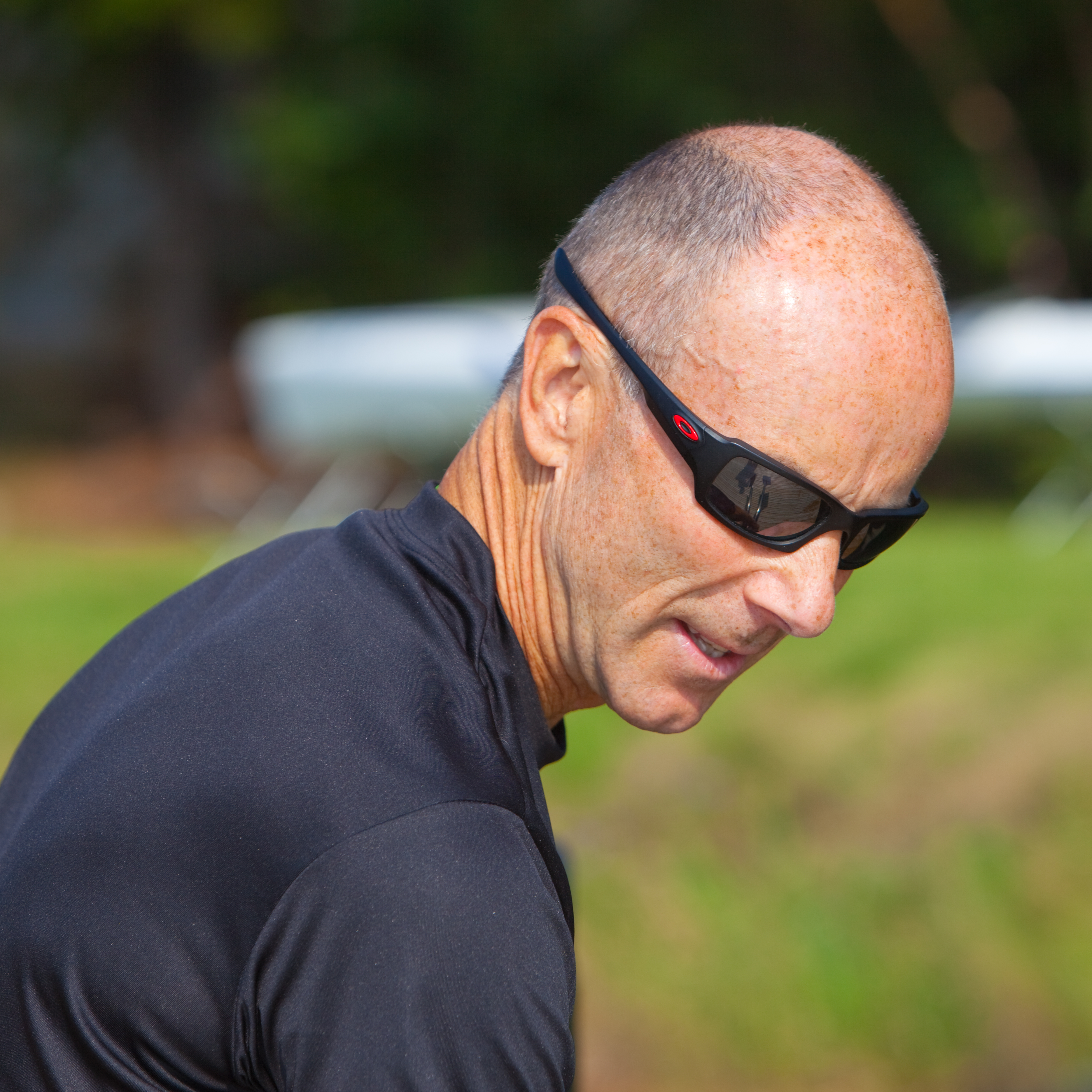 Ingemar Stenmark vid Distanskapprodden, Vaxholm 2011